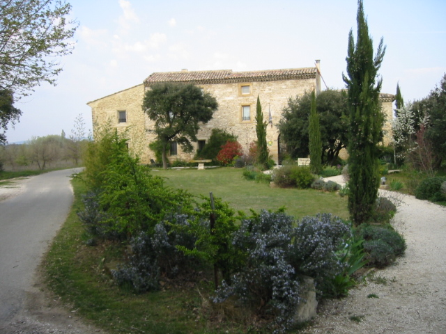 Ferme de la Commanderie de Templier de Richerenches (Vaucluse) France